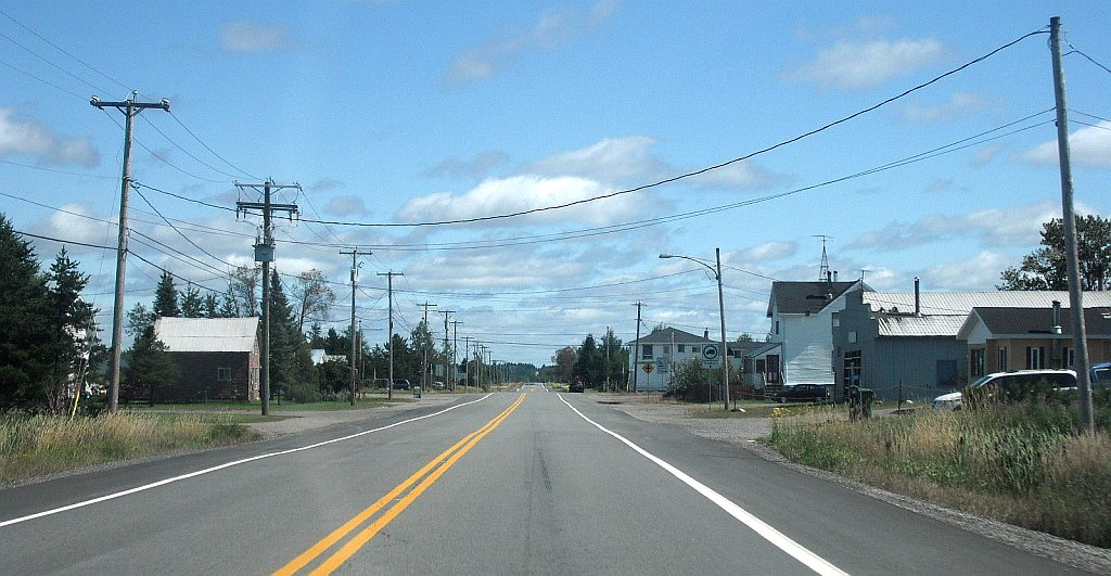 Vue sur la route 111 à Villemontel, en Abitibi, au Québec.